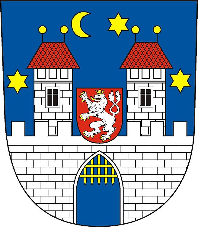 Písek: Městský znak